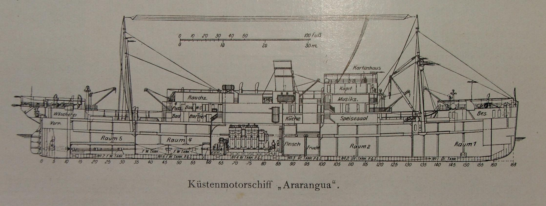 Schnittbild Küstenmotorschiff Ararangua